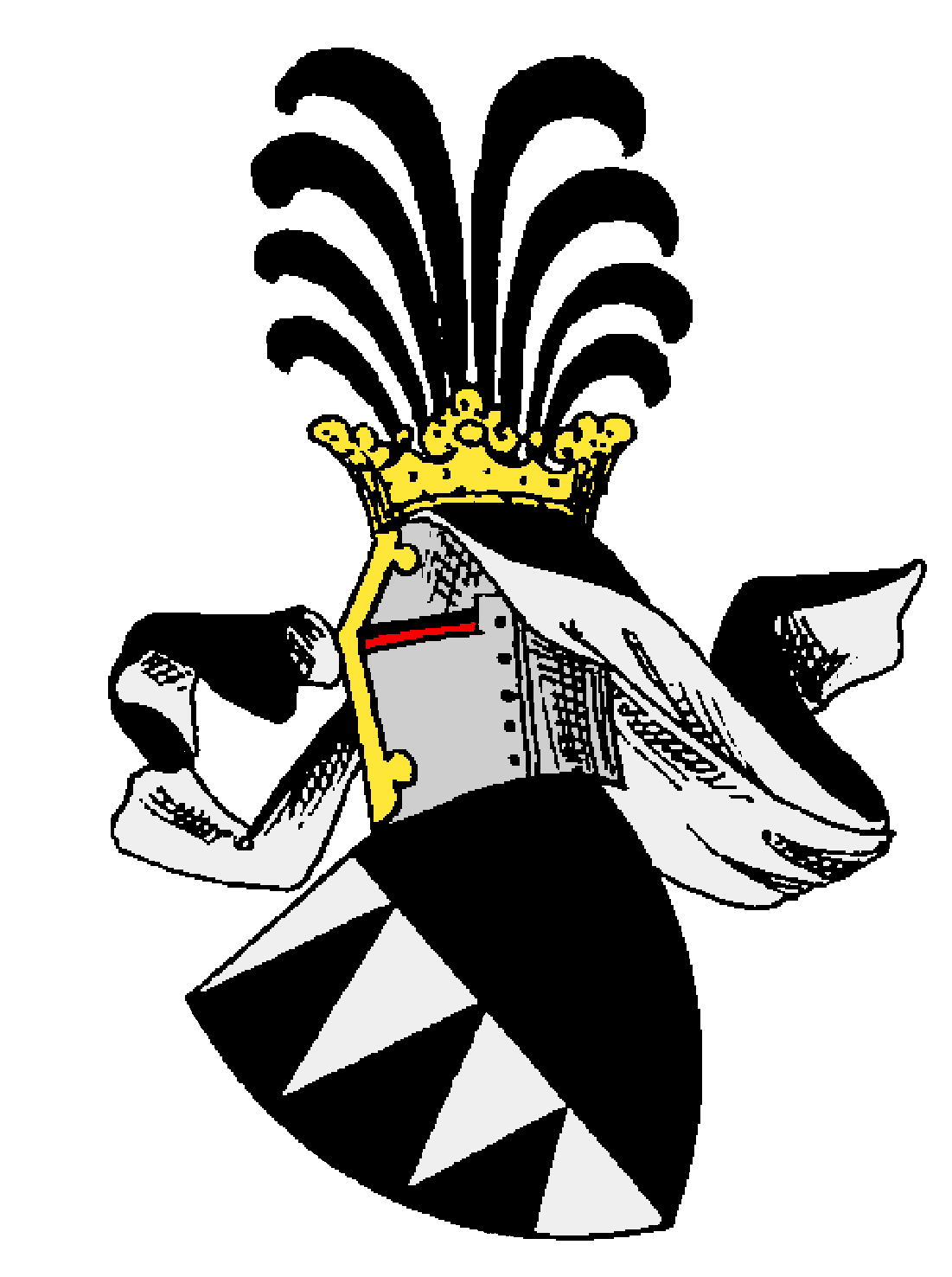 Wappen der von Weißpriach